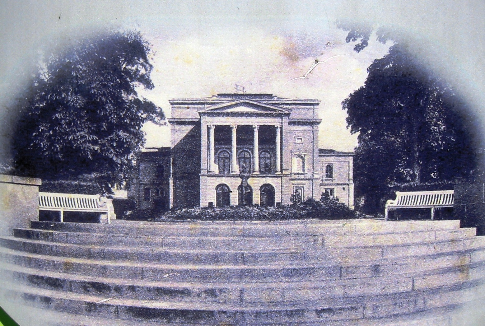 Abbildung des Theaters aus 1874 auf der Theaterinsel in Gubin, aufgenommen auf einer Informationssäule auf der Insel